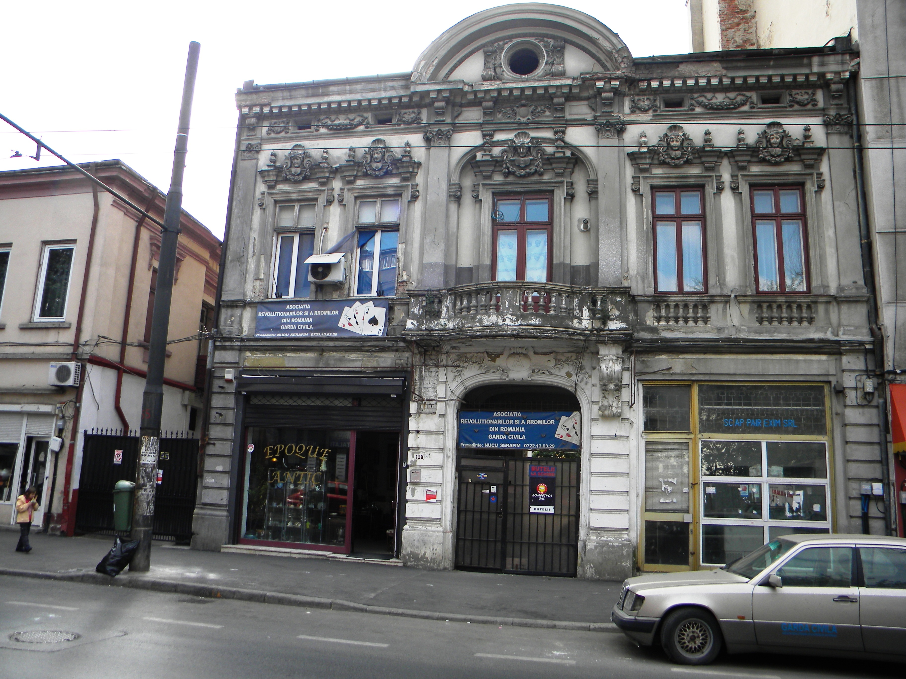 Bucuresti, Romania, Casa pe Calea Grivitei nr. 105, sect. 1